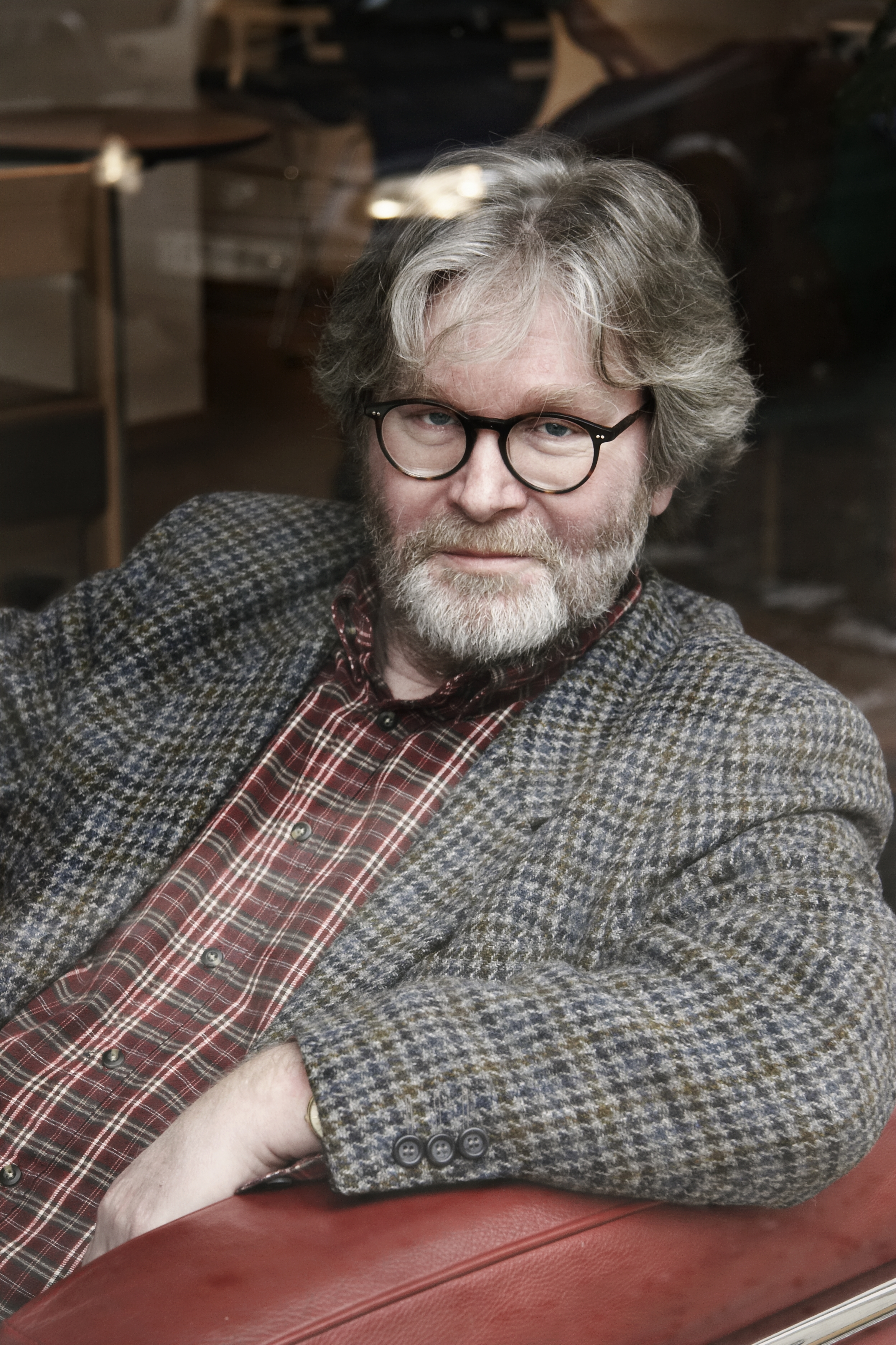 Staffan Söderblom, Swedish author